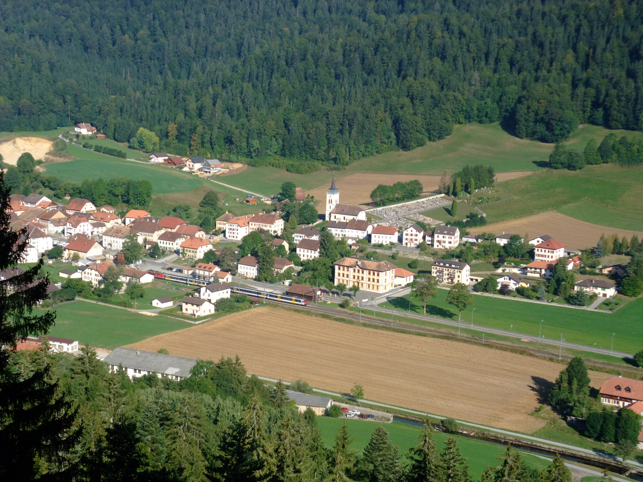 Buttes, vu depuis le sud